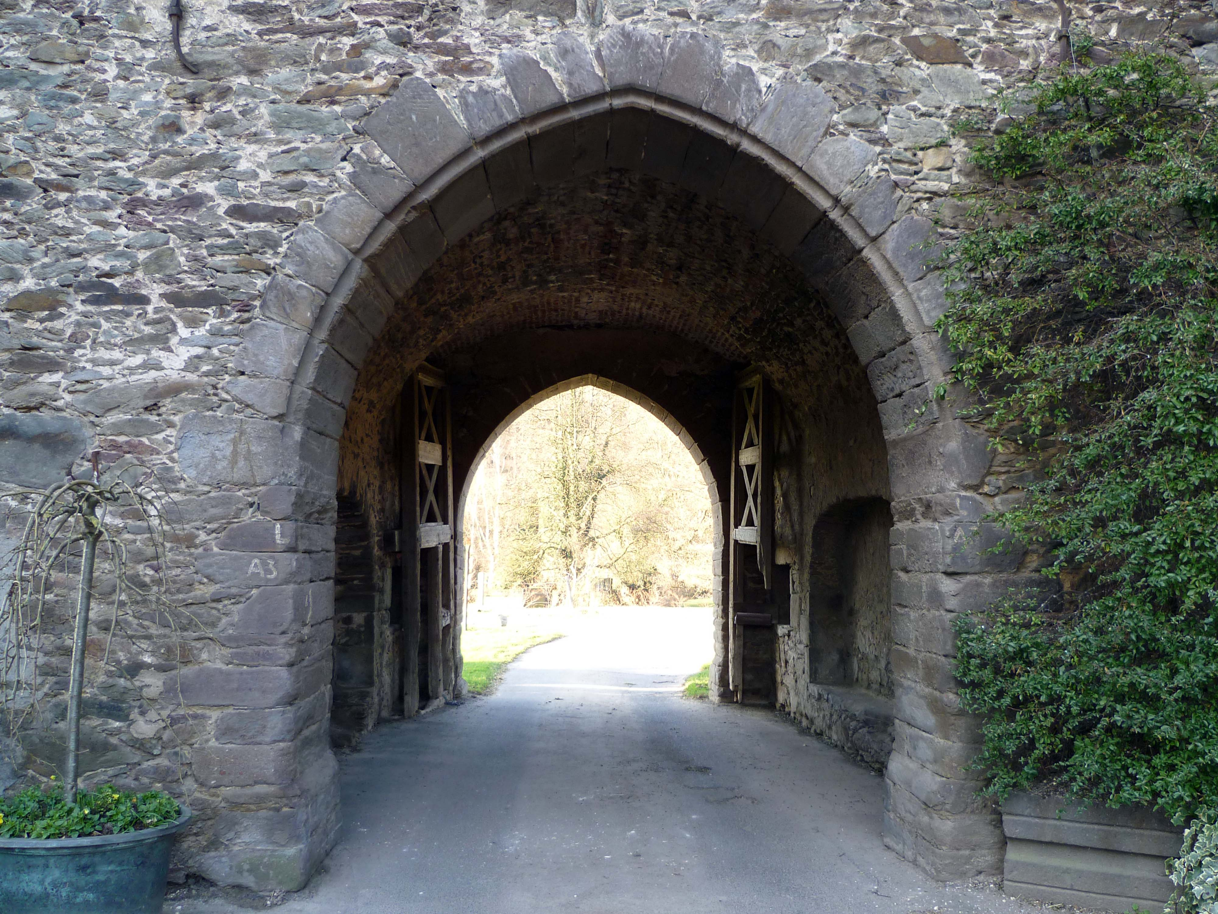 Burgtor von innen mit alten Türflügeln.